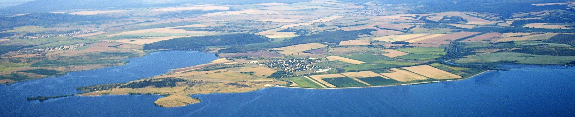 Bulgarien, Region Burgas: die Region südlich des Mandra-Sees mit den Dörfern Dimtschewo (vorn in der Mitte) und Iswor dahinter sowie Twardiza (links vorn) und Marinka links hinten. Rechts von Dimtschewo ist die Mündung des Flusses Isworska, was zum Naturschutzgebiet erklärt wurden ist.